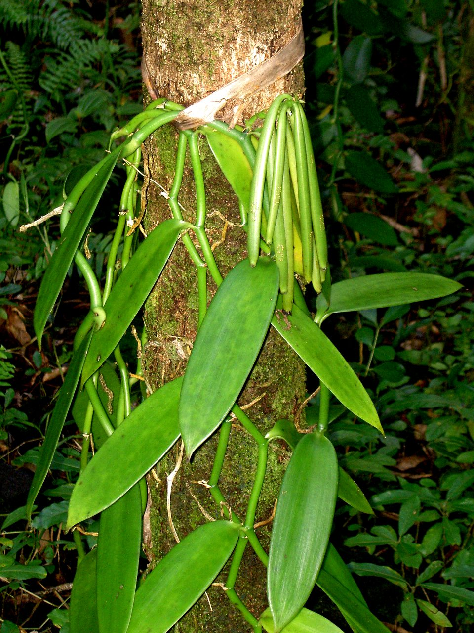 Gousses de vanillier presque mûres, Réunion.